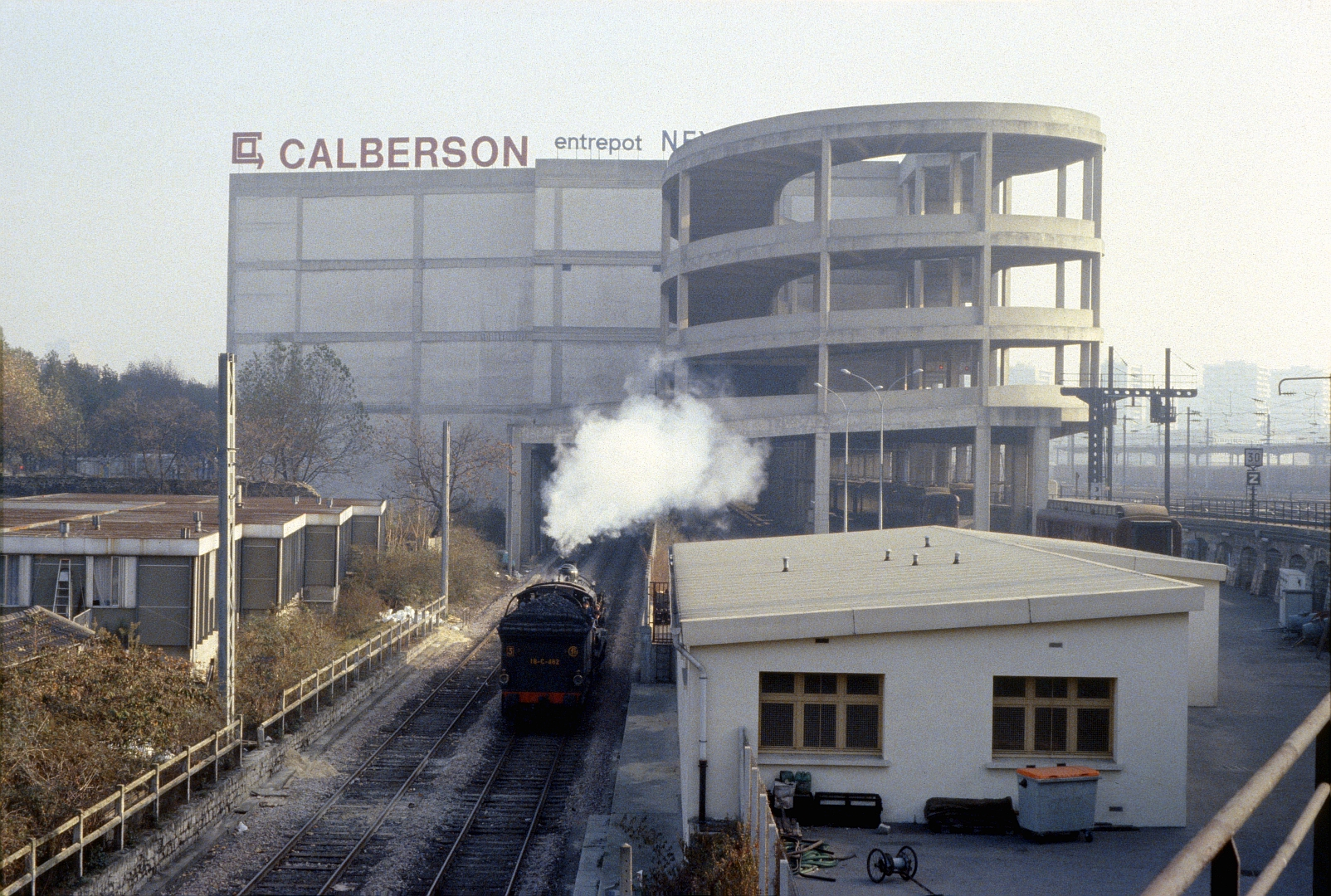 La Petite Ceinture de Paris entre la porte de la Chapelle et la porte d'Aubervilliers dans le 18e arrondissement le 19 novembre 1983.